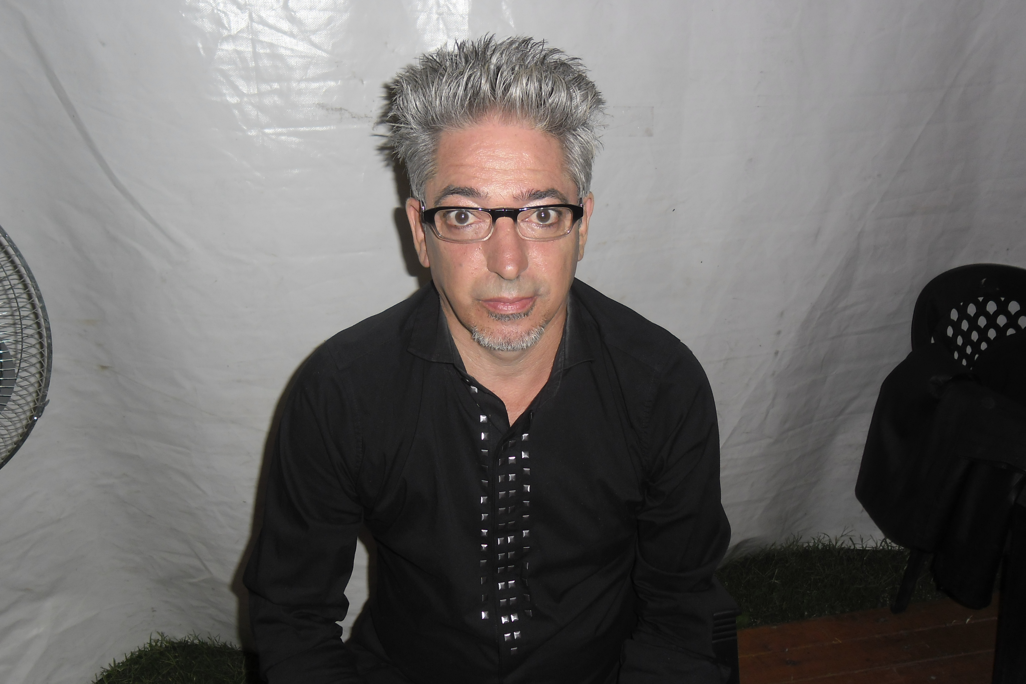 Marcelo Moura, actual vocalista del grupo de pop rock Virus, en la provincia de Mendoza, (2015).